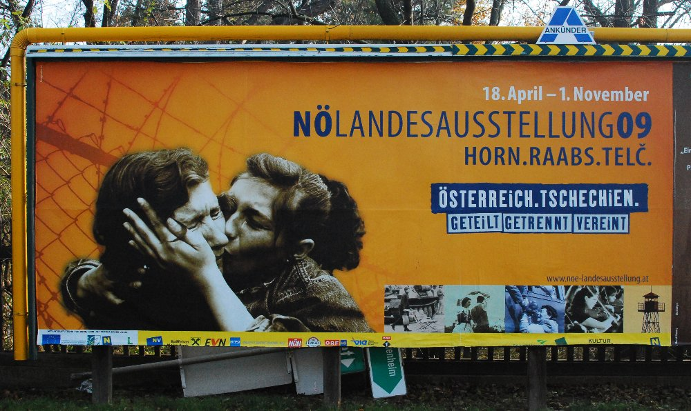 Werbeplakat für die Niederösterreichische Landesausstellung 2009 in Horn, Raabs und Telc (Tschechien).